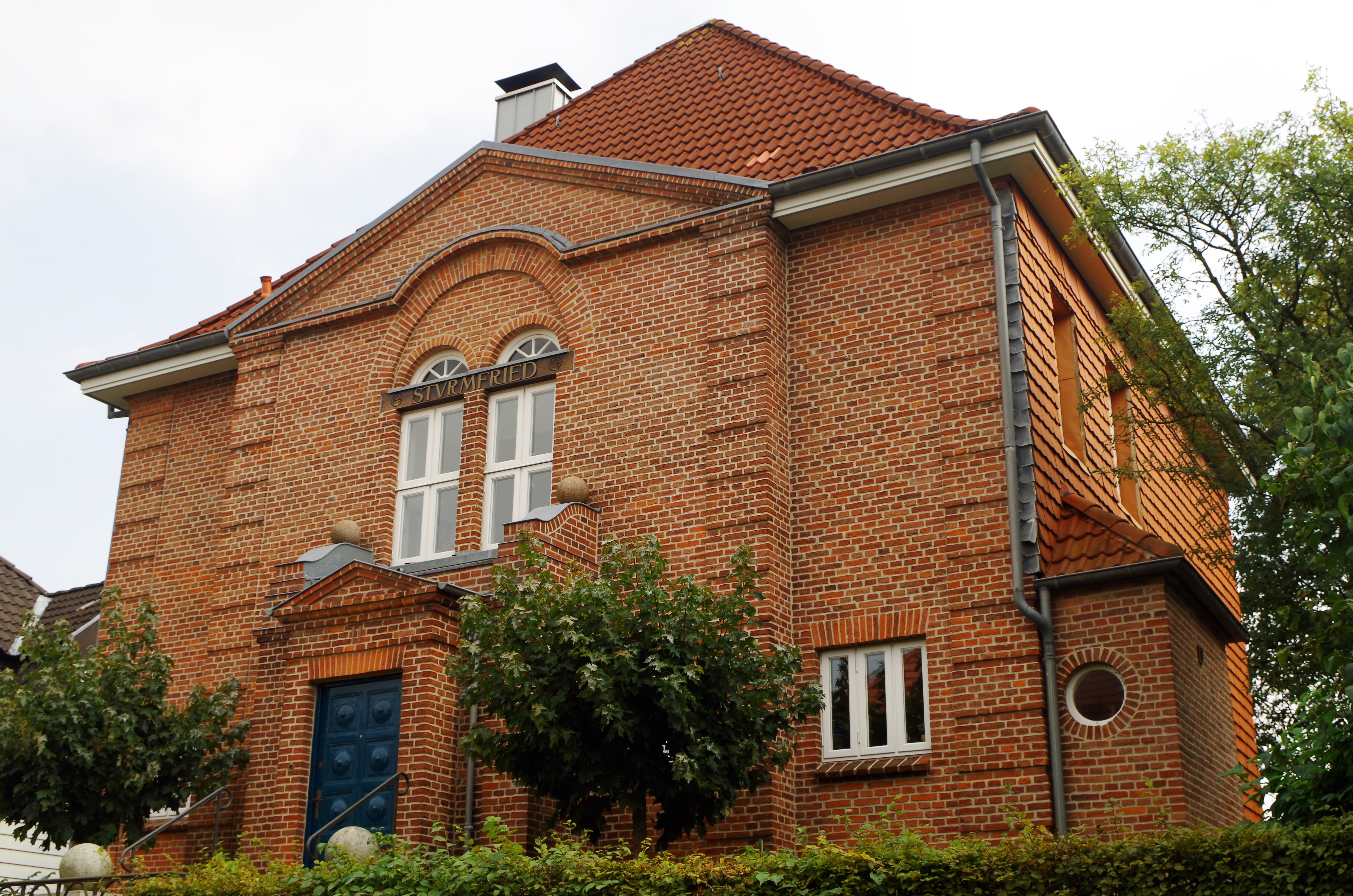 Flensburg, Friesischer Berg, Hebbelstr.11, Villa Sturmfried; ehemals Klaus-Groth-Straße 37